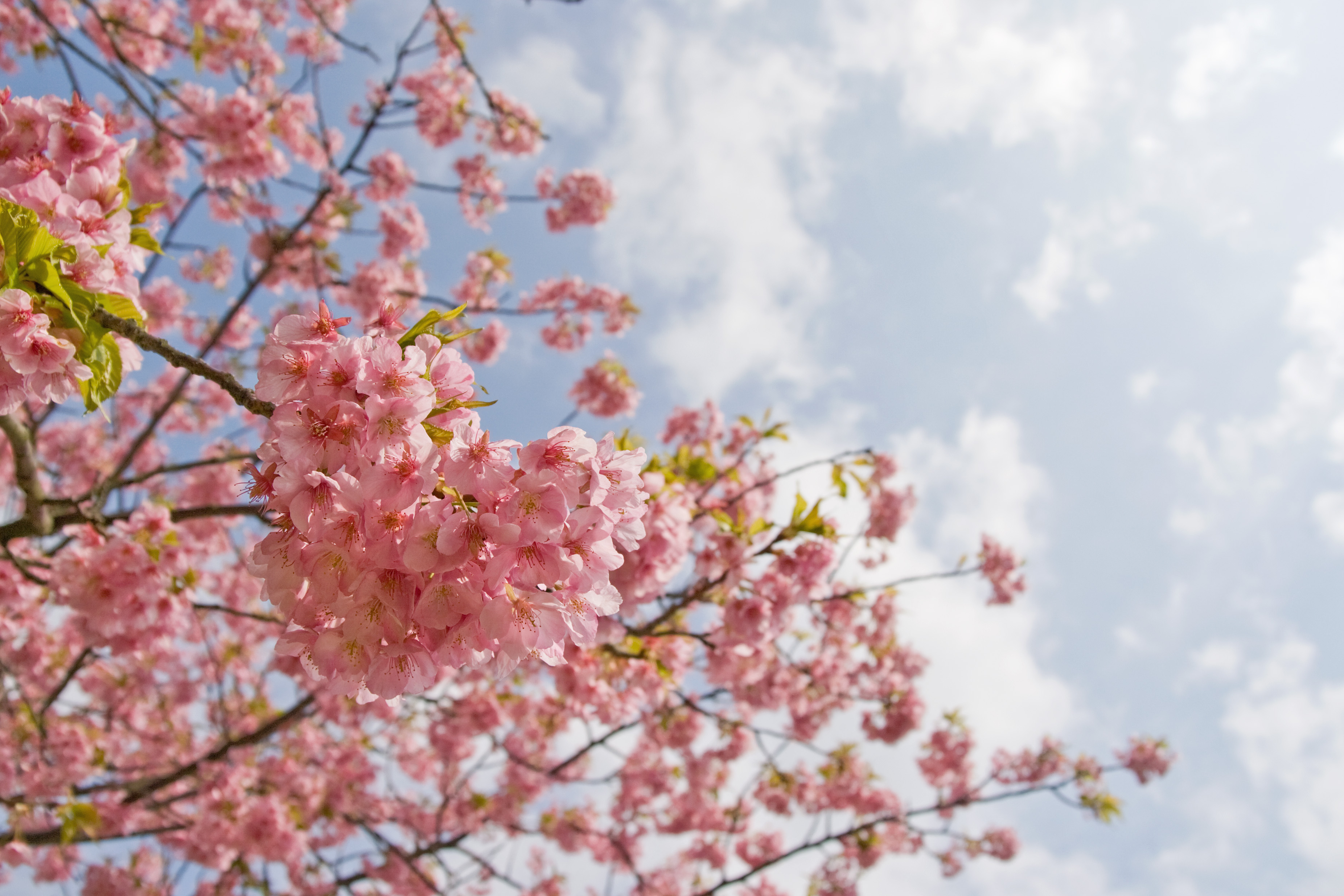 カワヅザクラ (学名:Prunus lannesiana cv. Kawazu-zakura)